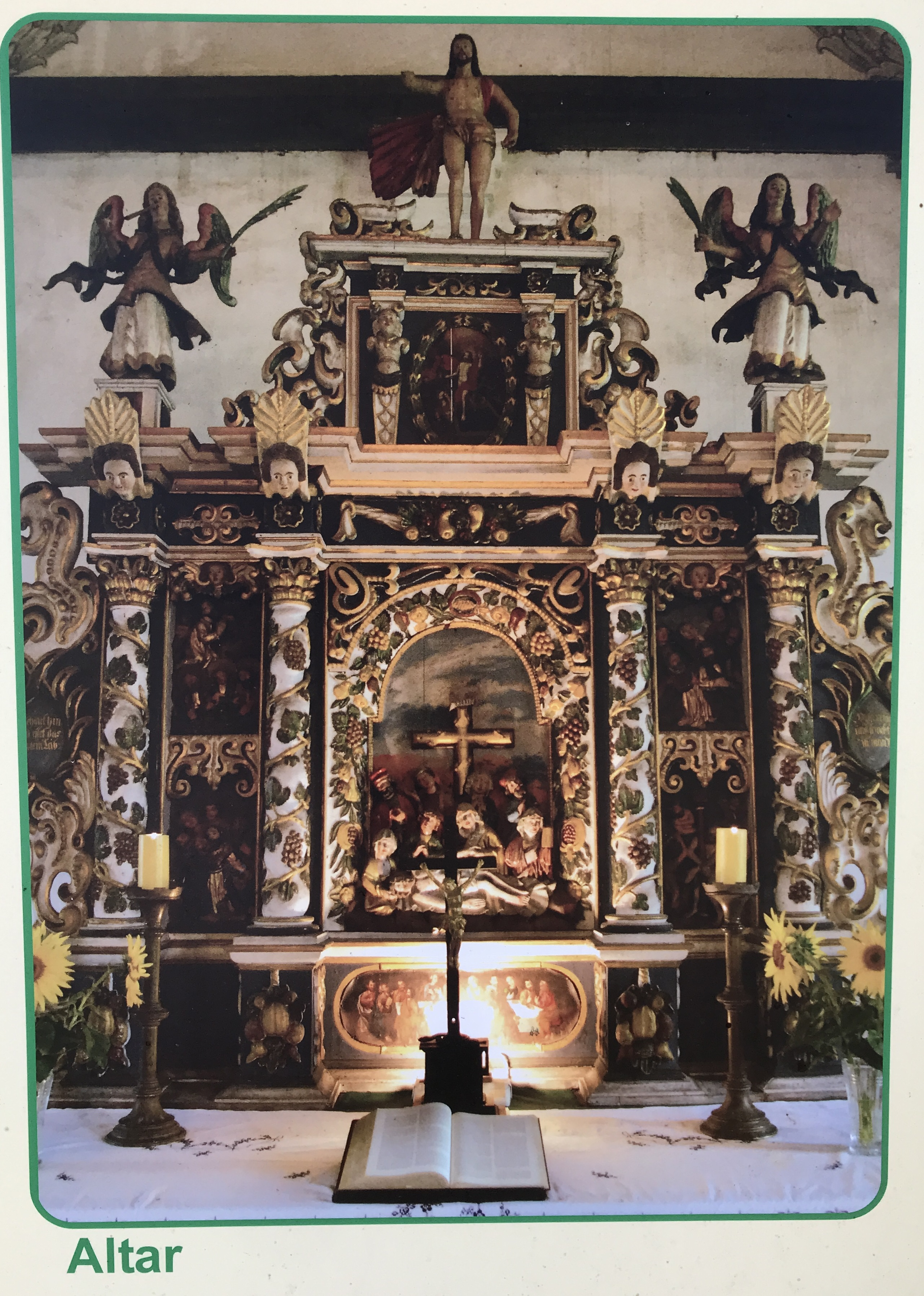 Die Dorfkirche in Groß Leine ist eine Saalkirche, die im Kern im 15. Jahrhundert errichtet wurde. Von 1906 bis 1910 erfolgte ein umfassender Umbau, bei dem auch die Vorhallen im Norden, Süden und Osten hinzukamen. Aufnahme auf einer öffentlich zugänglichen Tafel östlich der Kirche.